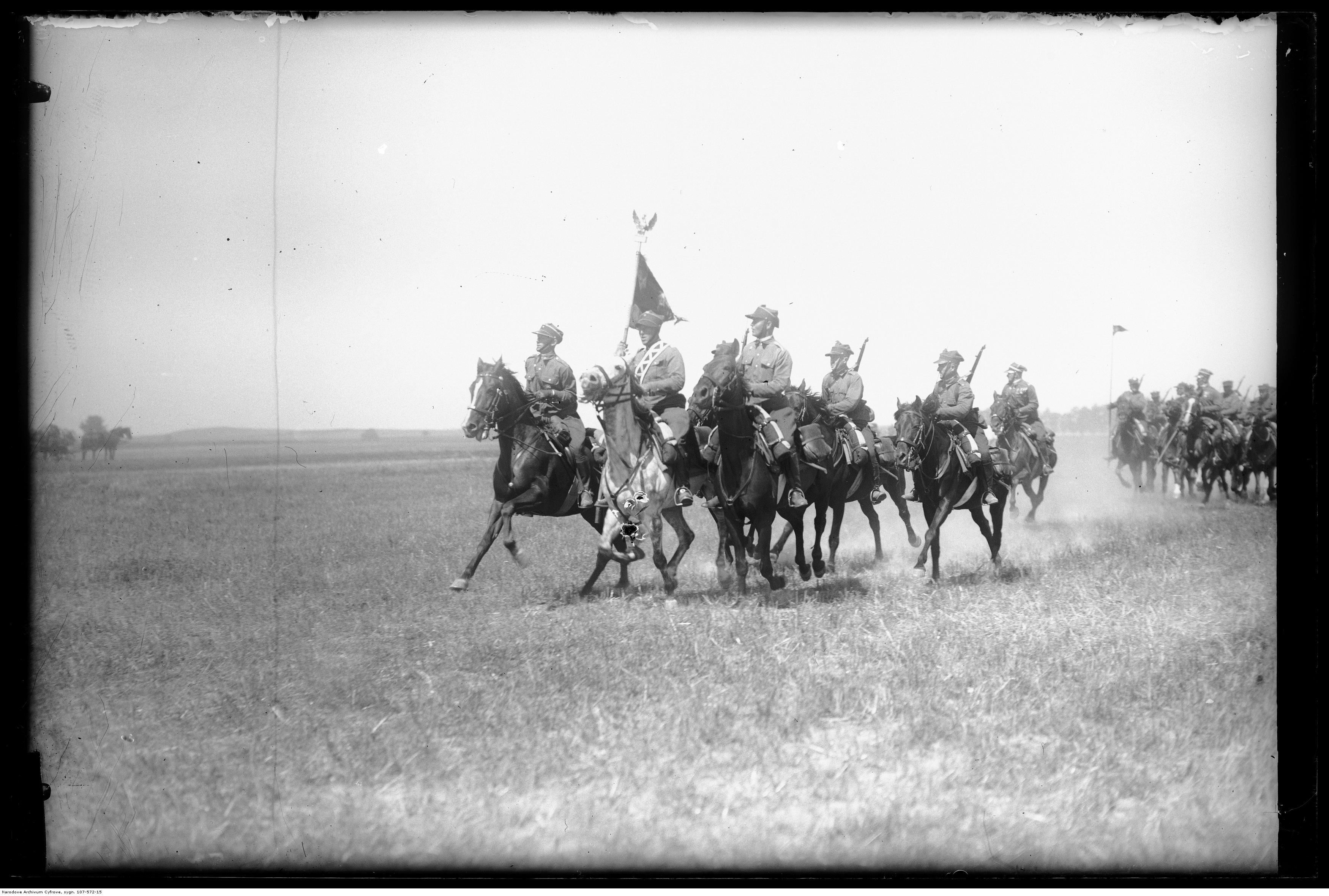 Defilada 5 Pułku Ułanów. Na przedzie poczet sztandarowy.